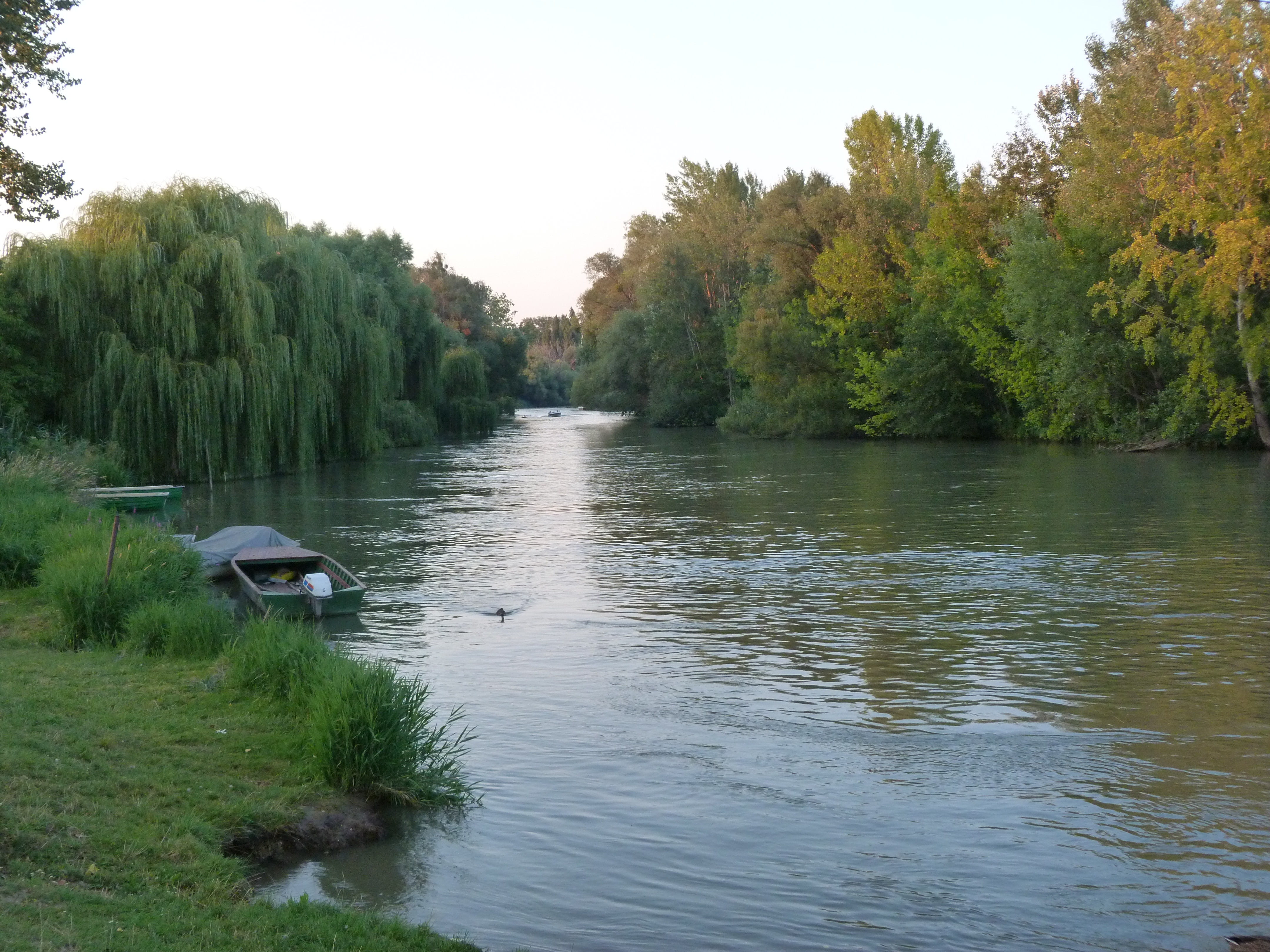 A felvétel 2013. Augusztus 18 –án, vasárnap készült Mosonmagyaróváron. A város főutcáján felállított színpadon a Magna Cum Laude zenekar. Mosonmagyaróváron a Szent István Király út mosoni részén rendezték meg a 4. Mosonmagyaróvári Nyári Fesztivált. ©© Published under Creative Commons in the Metapolisz DVD line. All of the photos and vids in the Metapolisz DVD line are under Creative Commons and can be used even for commercial – for profit – purposes. Recommended Citation Derzsi Elekes Andor: Metapolisz DVD line